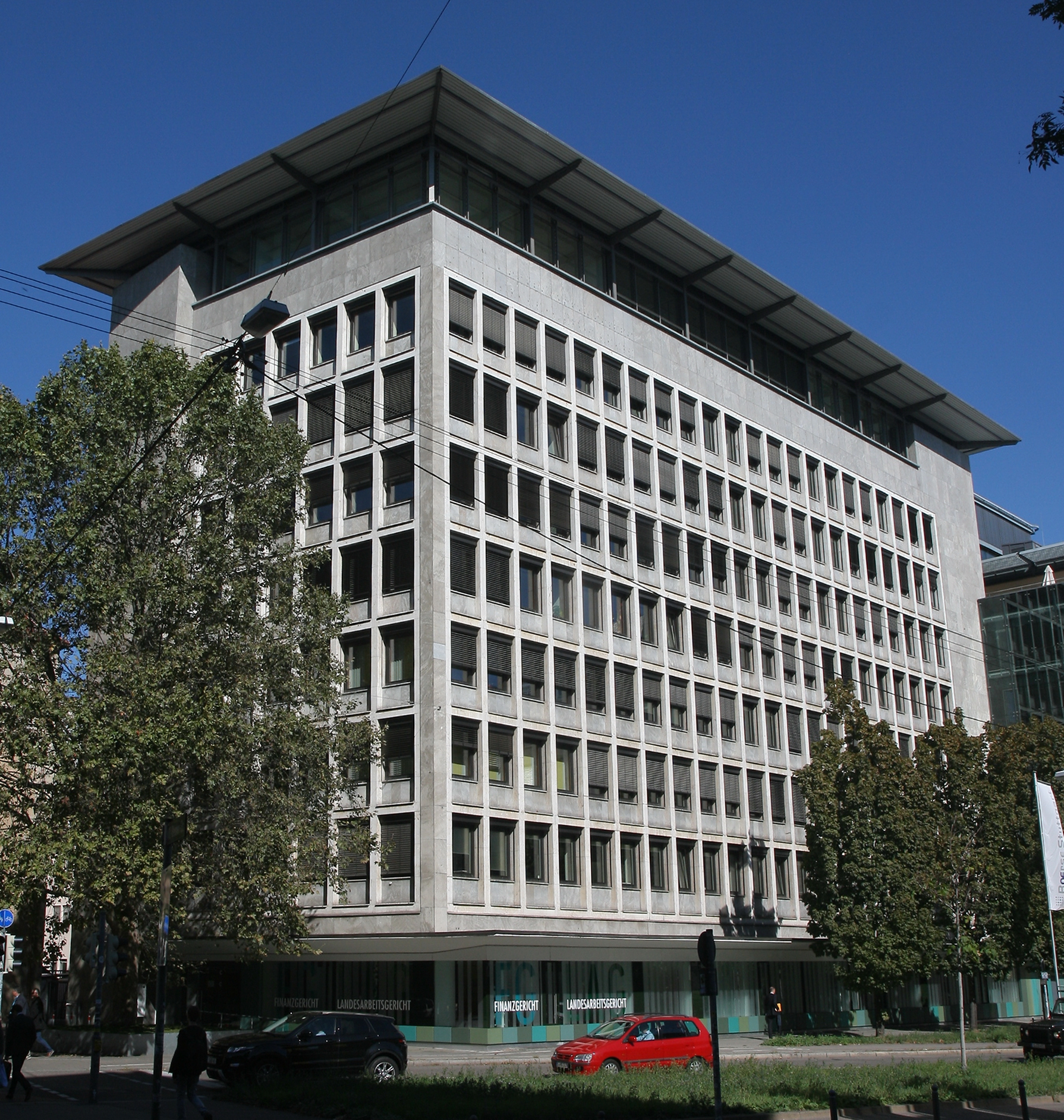 Finanzgericht Baden-Württemberg und Landesarbeitsgericht Baden-Württemberg in Stuttgart, Börsenstraße 6 (ehemals Schlossstr. 22).